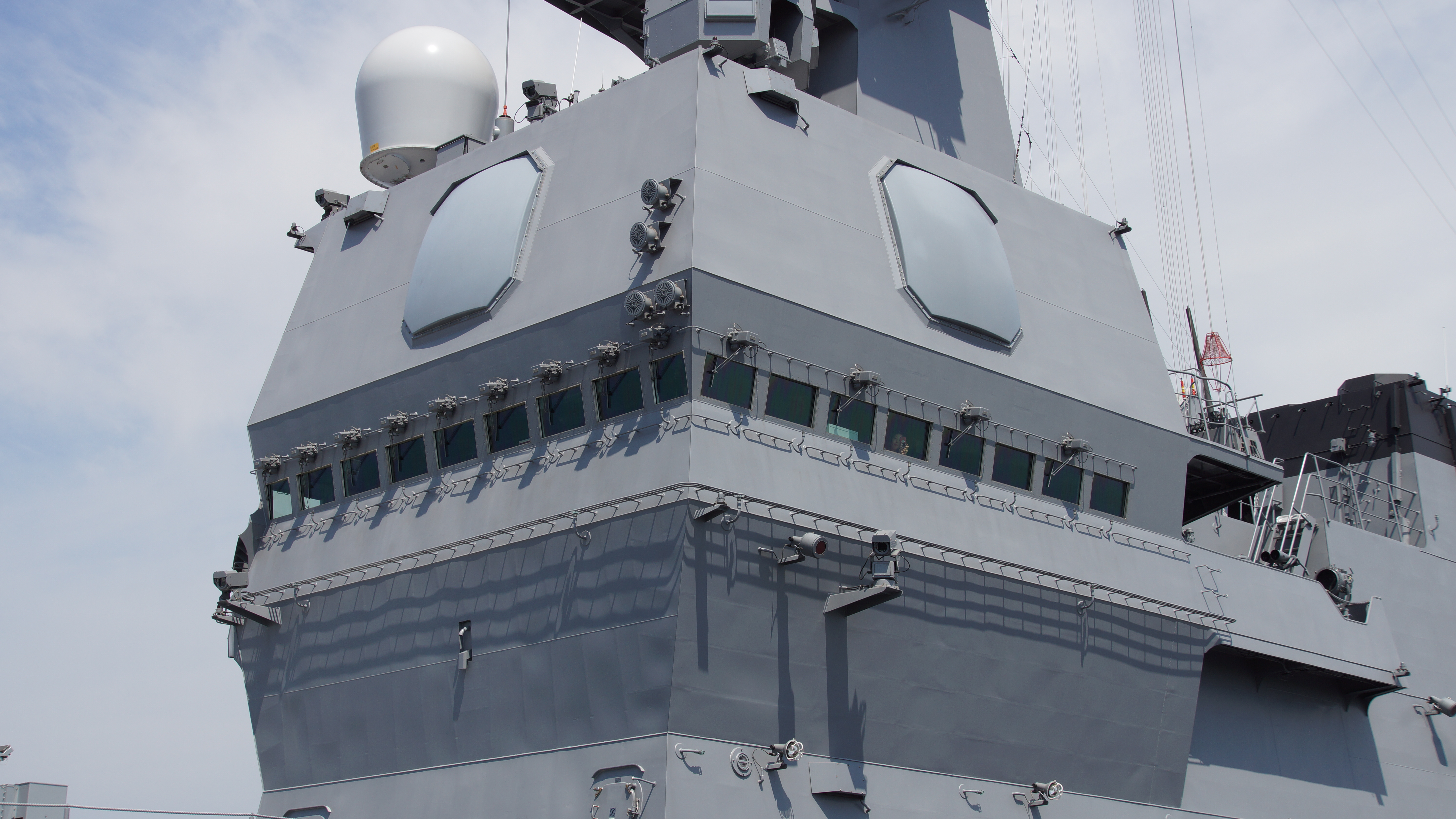 海上自衛隊 ヘリコプター搭載護衛艦かが（DDH-184） 航海艦橋 左前面。2017年7月15日 金沢港にて。